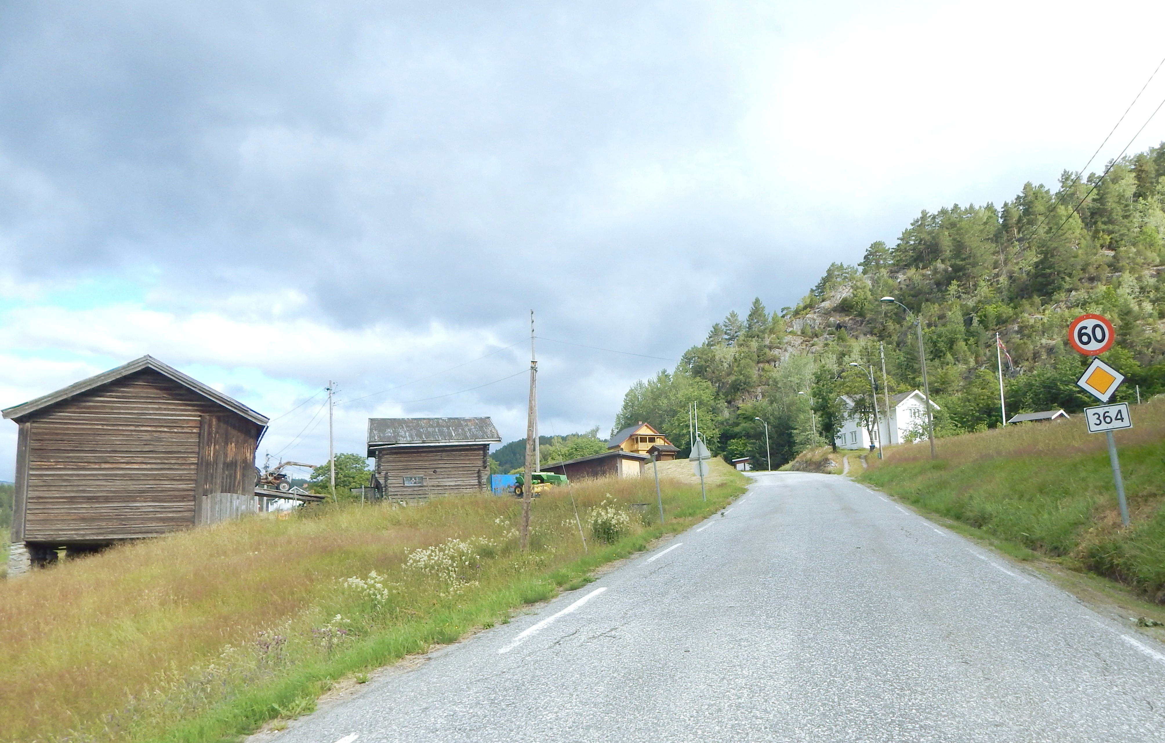 Primær fylkesvei 364 i Hovin i Tinn